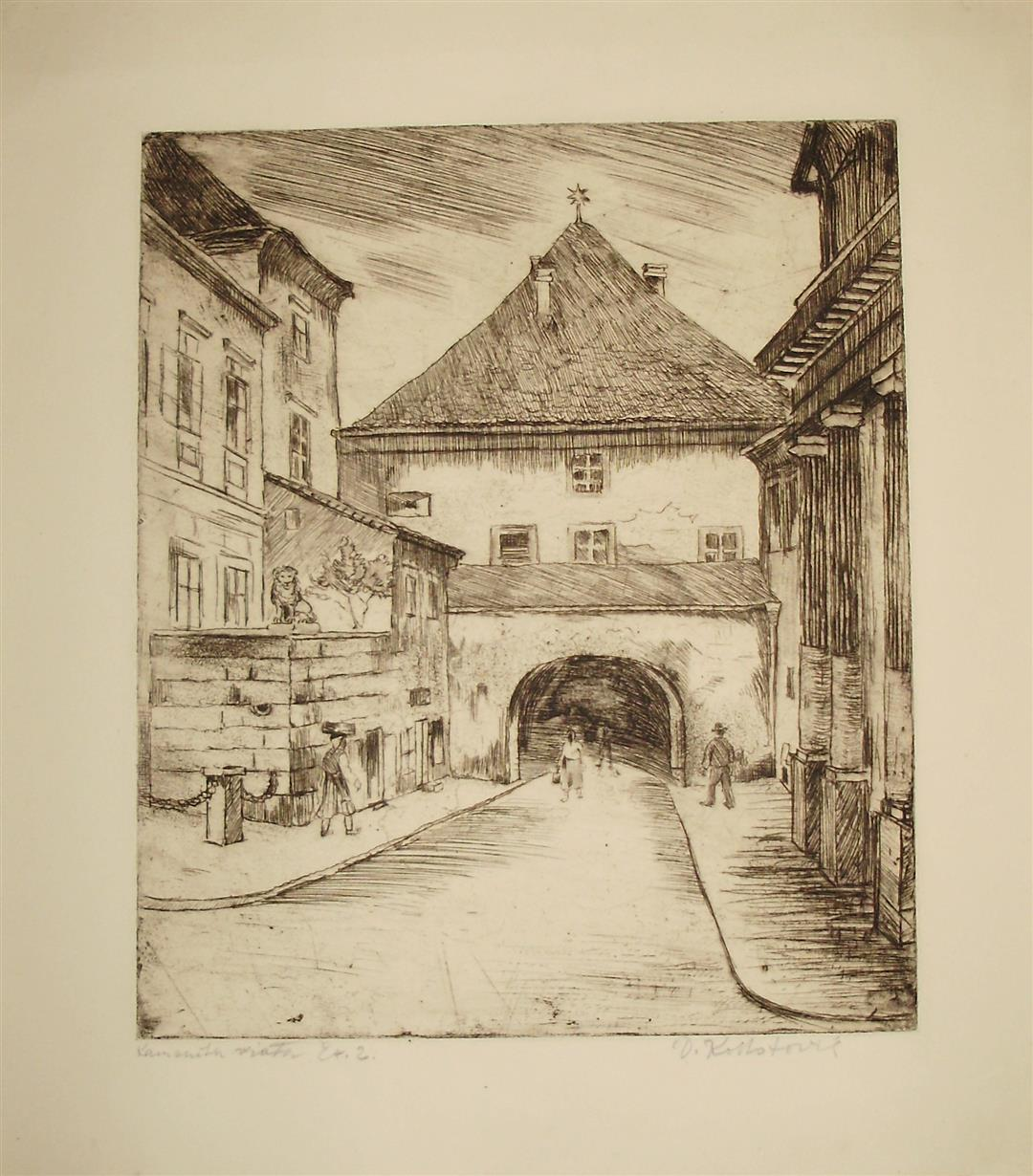 Srpski (latinica): Kamenita vrata, autor: Kokotović, Dušan mjesto izrade: Zagreb vrijeme izrade:1925. g.